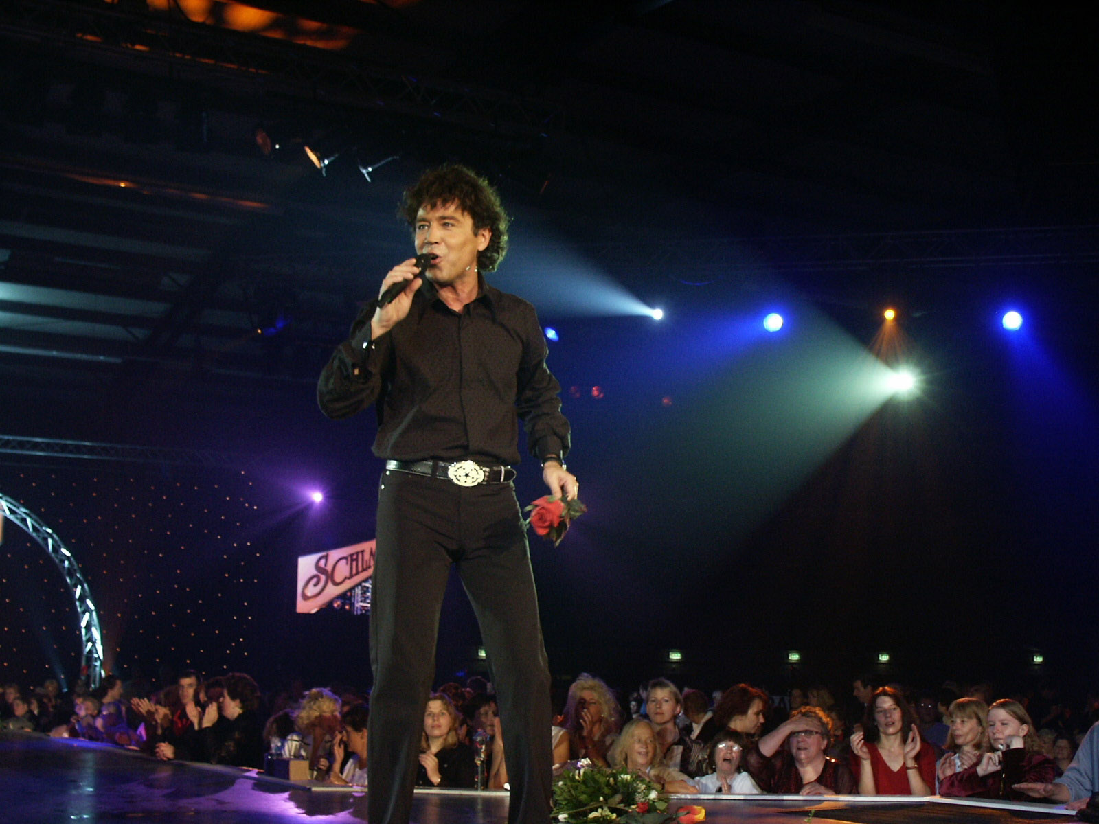 Dennie Christian, opgenomen tijdens het "Schlagerfestival" in Zuidbroek, oktober 2001